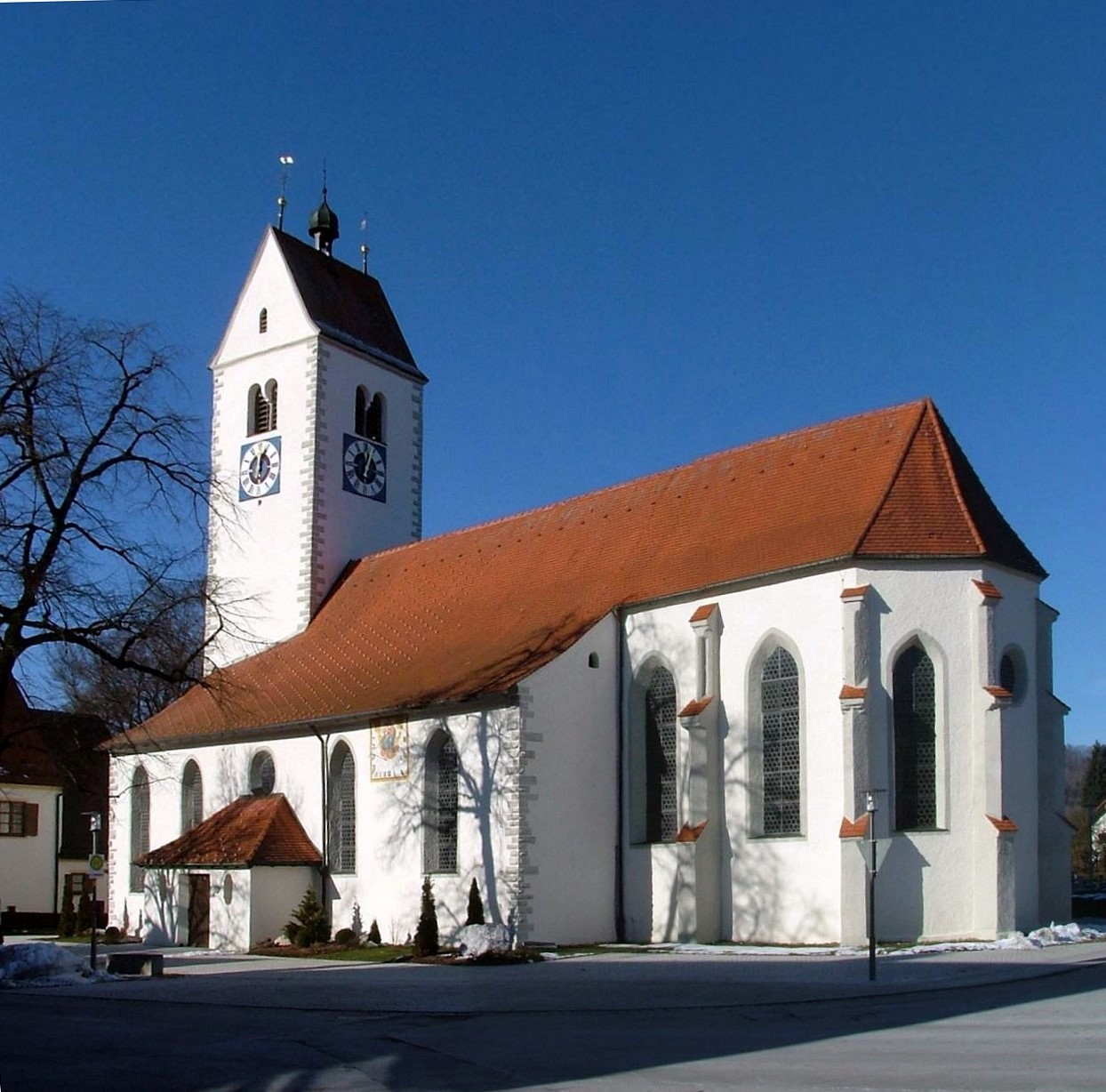 Wildpoldsried